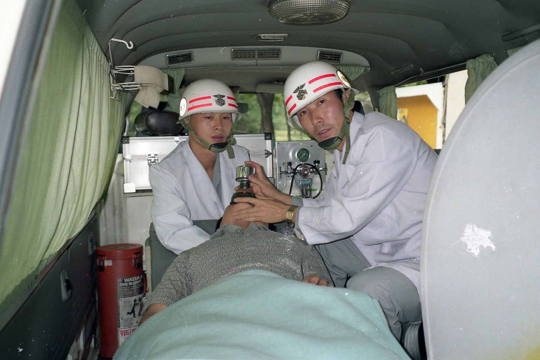 119구급대 역사 사진(1980년대, 1990년대초)